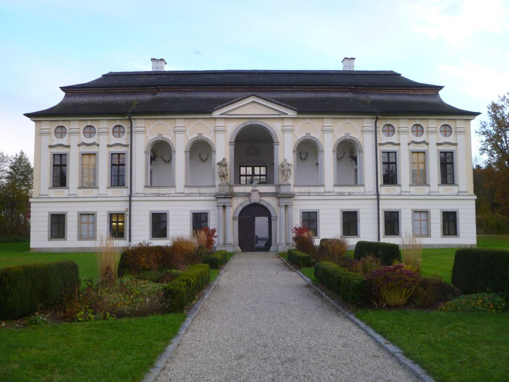 Schloss_Hohenbrunn